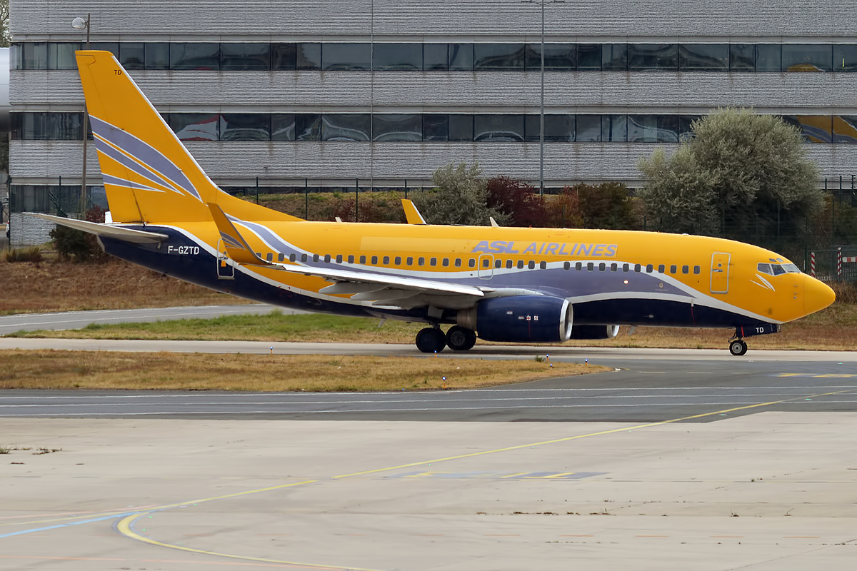 ASL Airlines France, F-GZTD, Boeing 737-73V